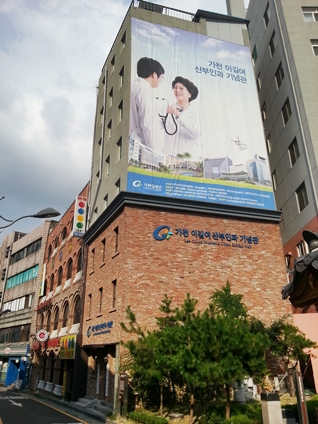 가천 이길여 산부인과 기념관 . 인천광역시 중구 인현동